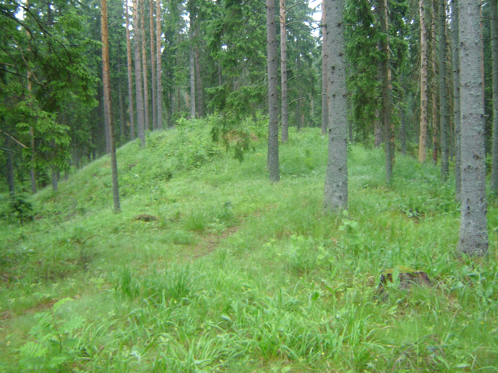 Mädara linnamägi